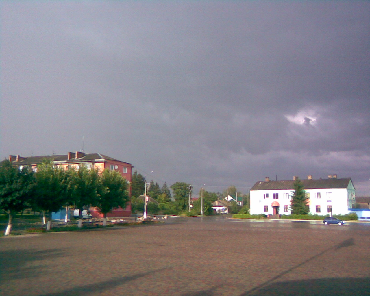 Сарни